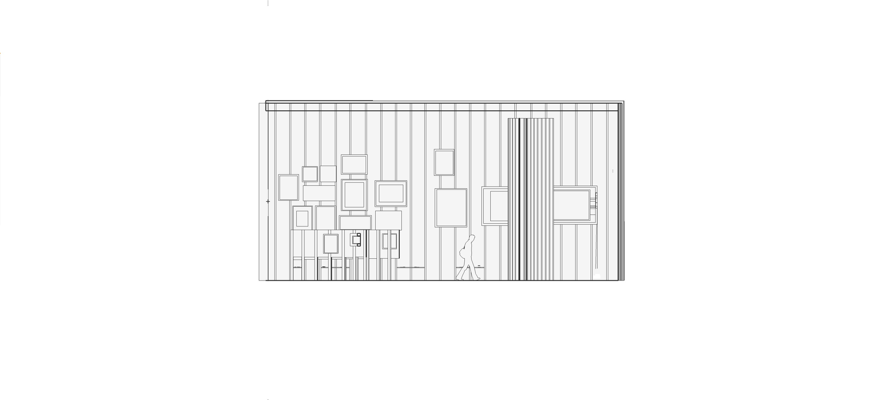 Template:Screenshotcopyrighted